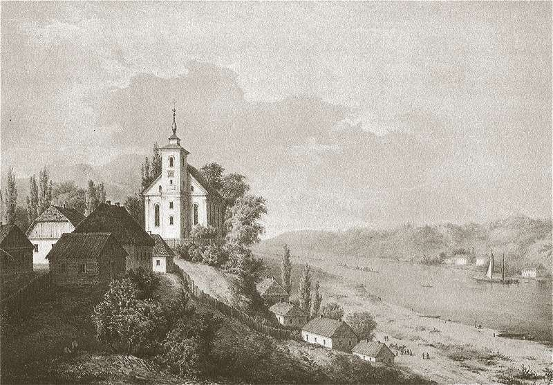 Veliuona, Lithuania